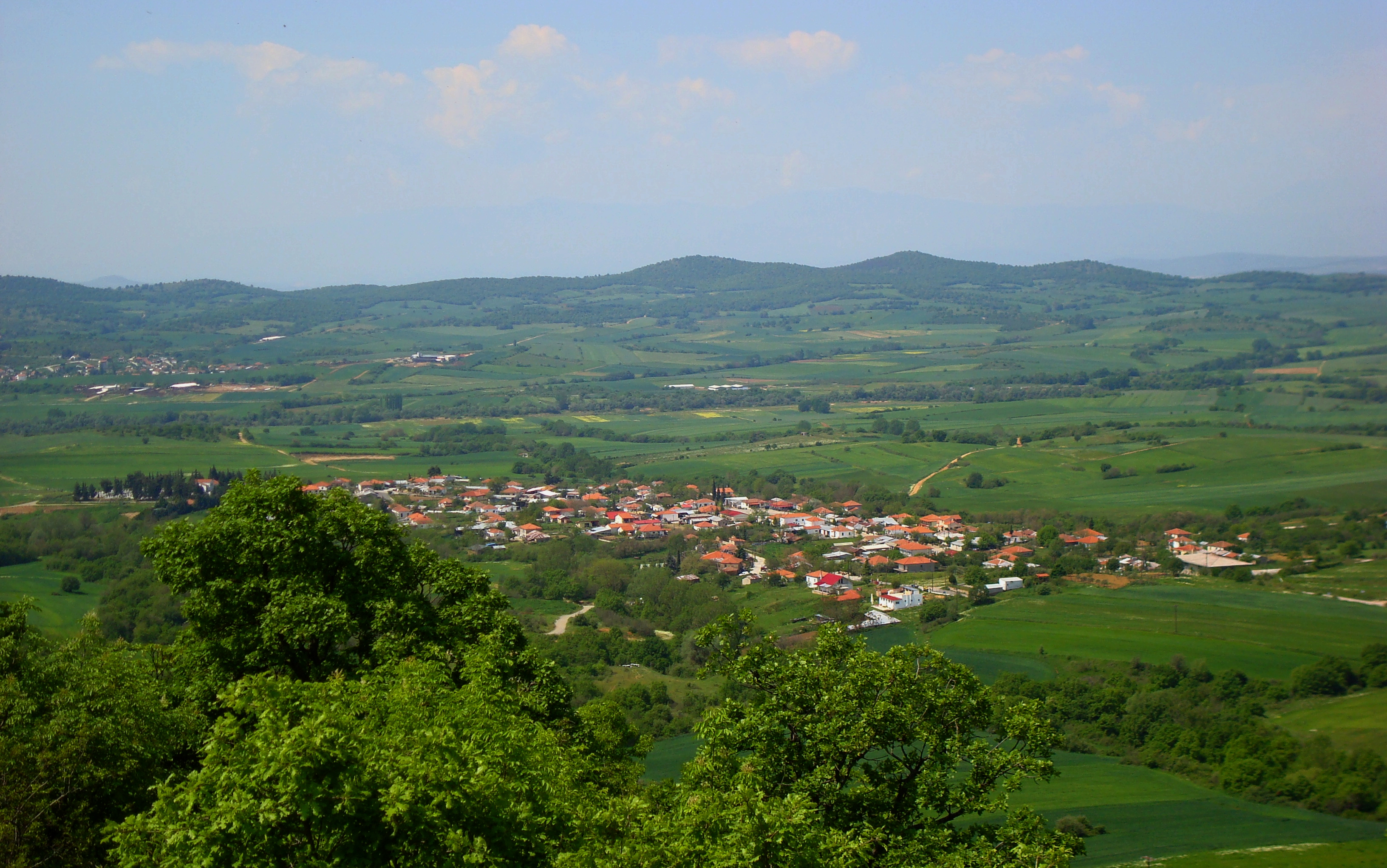 Άποψη του Γερακαριού από το λόφο "Κολώνα"